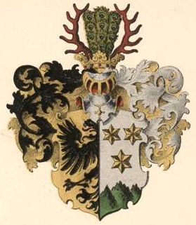 zum Berge suguvõsa parunivapp